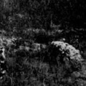 Le site du dolmen de Villaine, à Sublaines (détail).